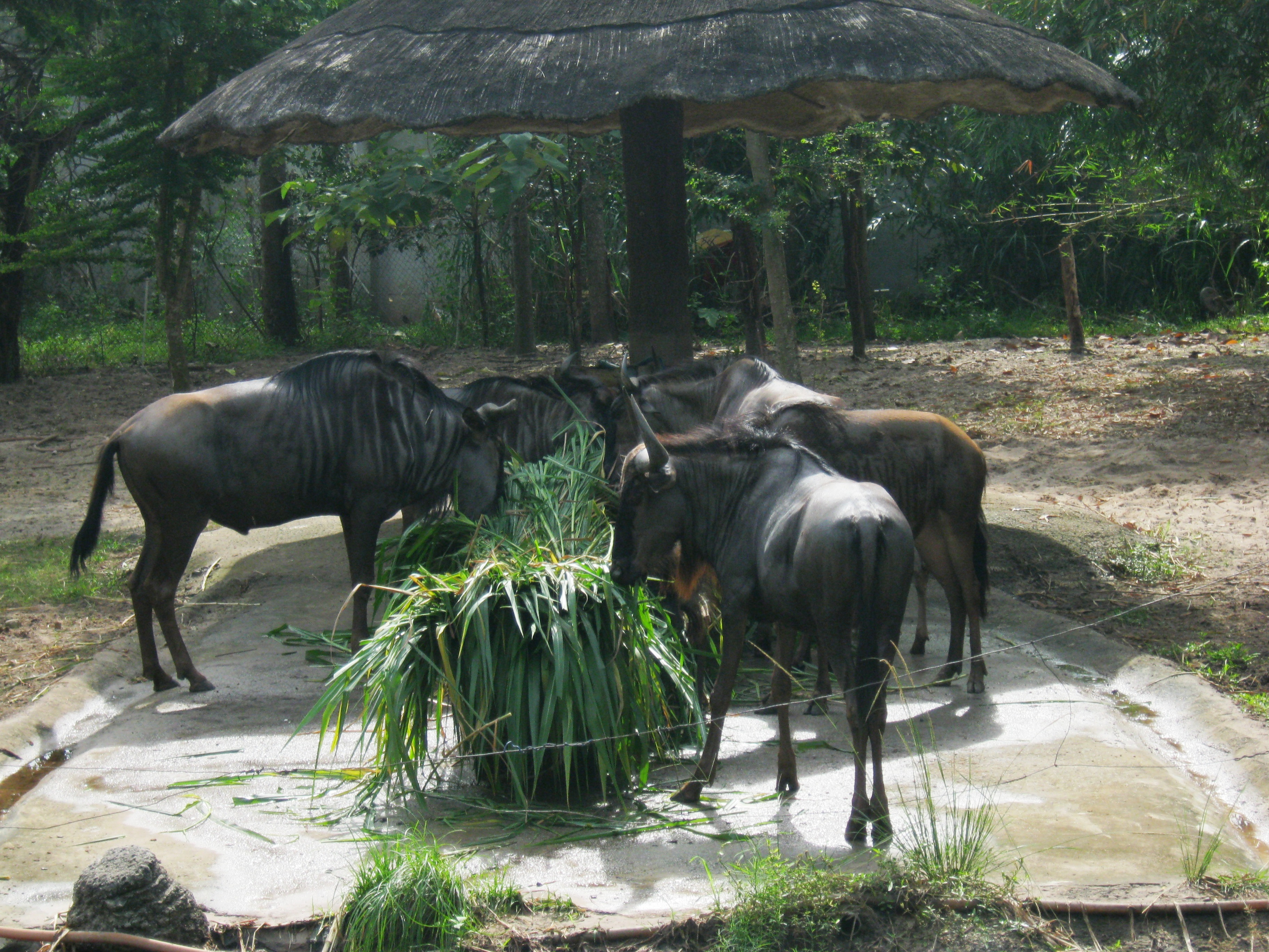 Linh dương đầu bò (Blue Wide Beest- Connochaetes Taurinus) thường sống ở Nam Châu Phi. Hiện chúng được nuôi trong khu Lạc Cảnh Đại Nam Văn Hiến (Bình Dương, Việt Nam).